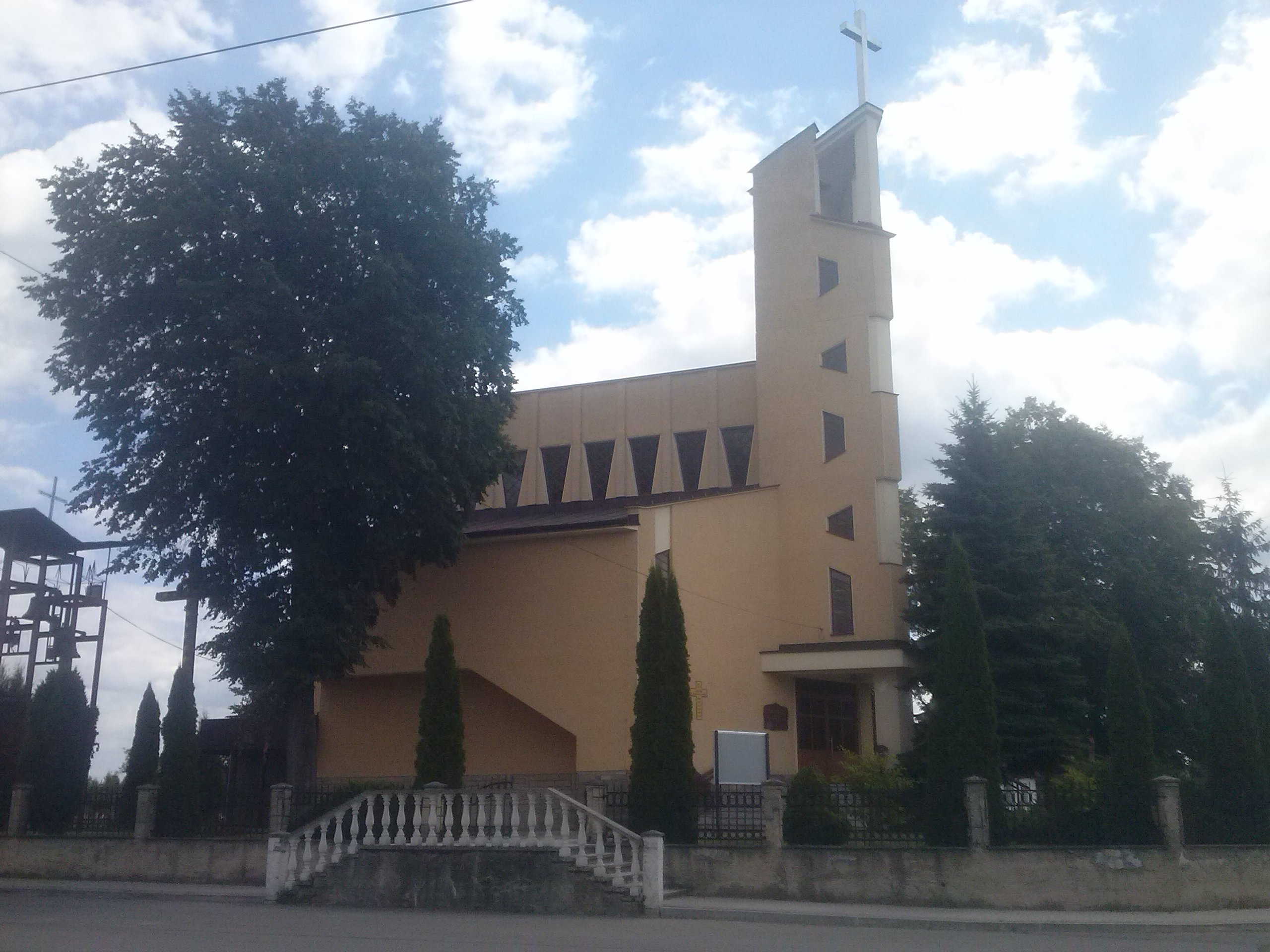 Kościół parafialny pw. św. Karola Boromeusza w Piskorowicach